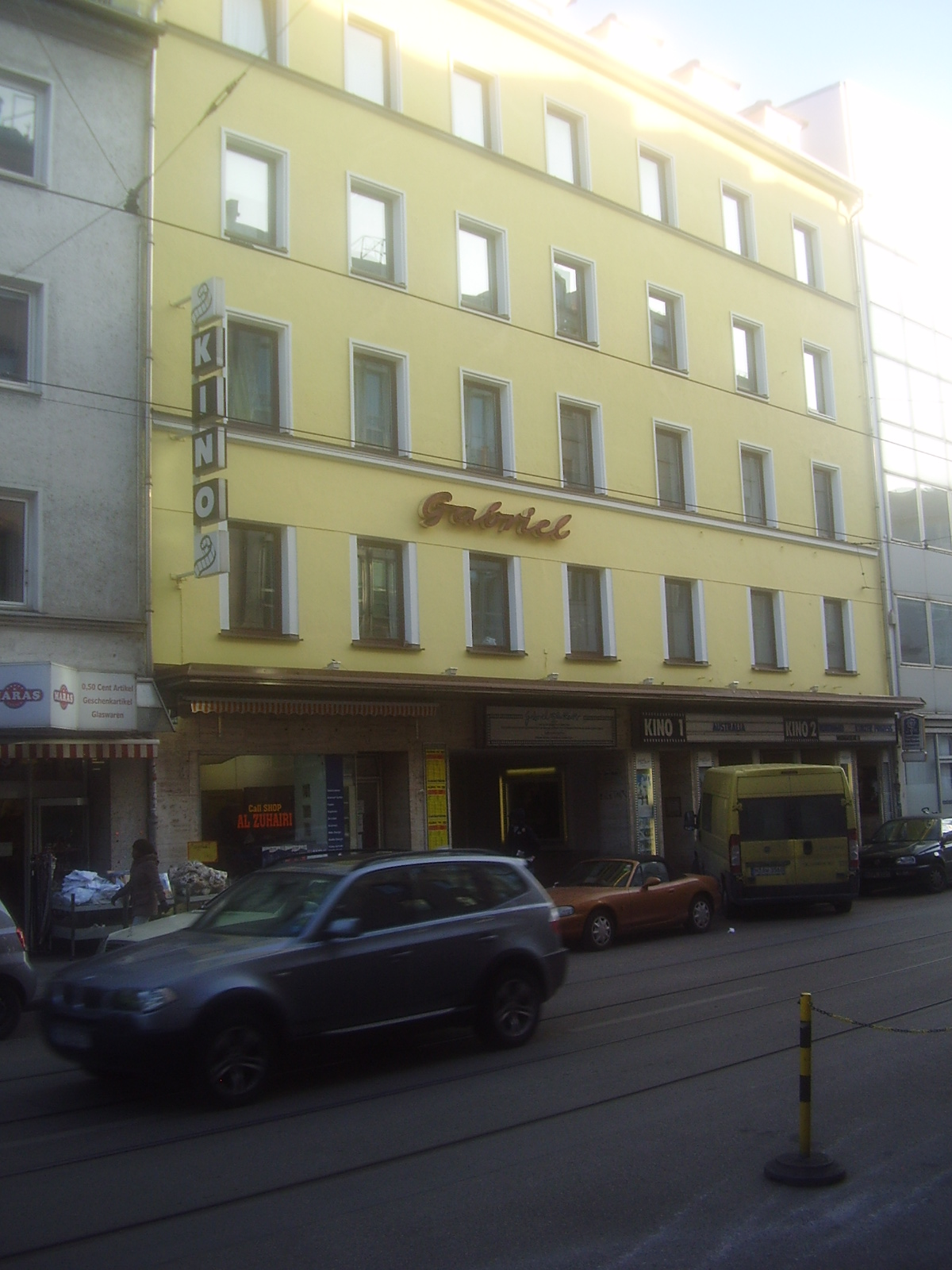 „Gabriel“, Kino in der Dachauerstraße, München. Das älteste Münchner Kino; gegründet 1906 von Carl Gabriel unter dem Namen „The American Bio.-Cie.“